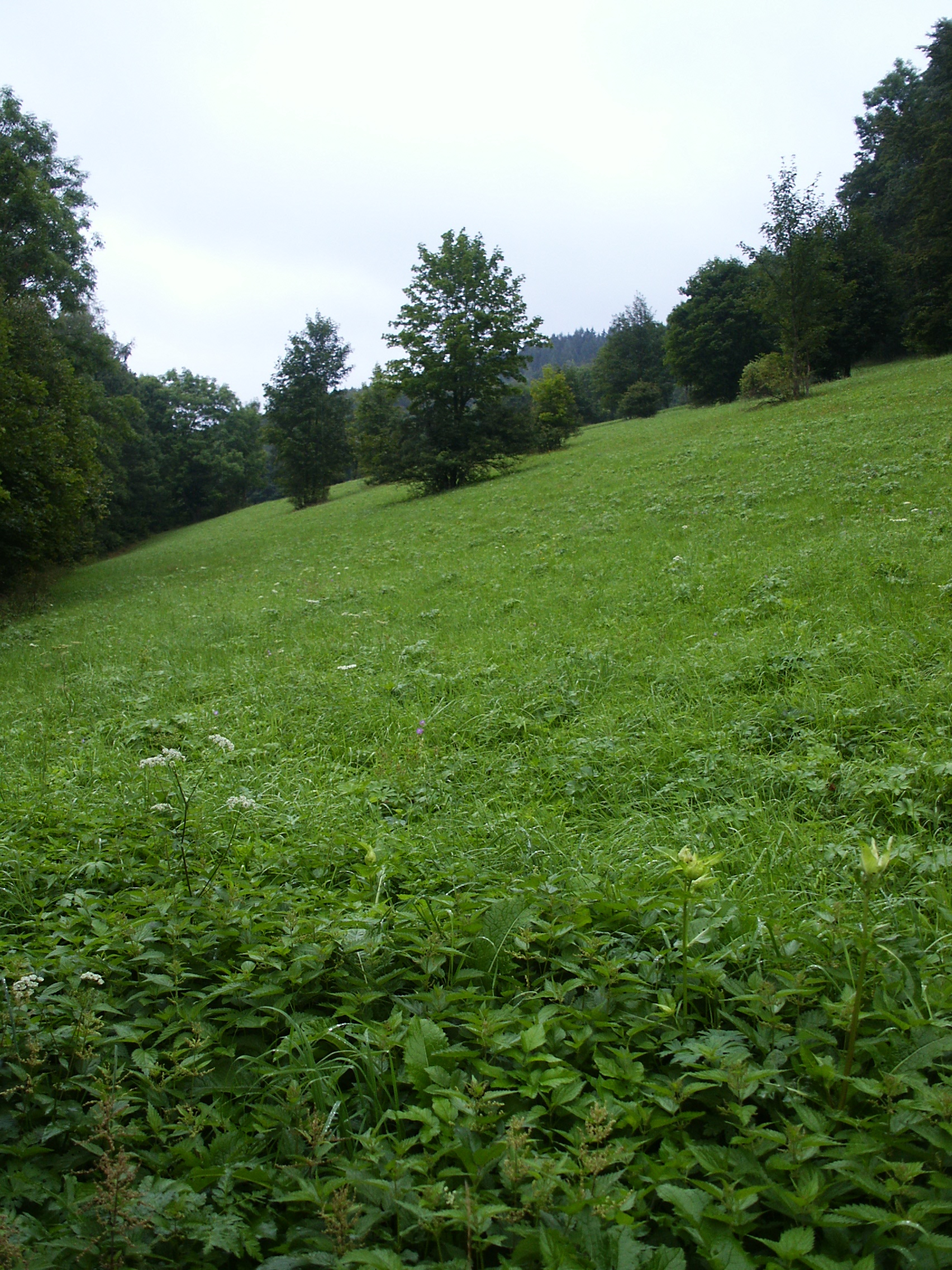 Sklenářovické údolí